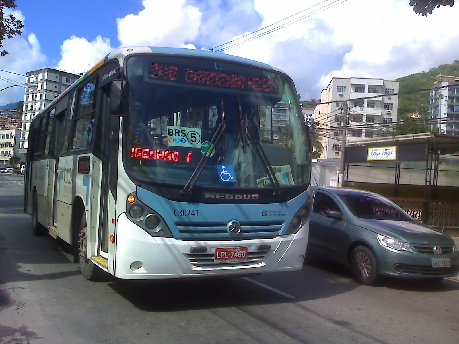 No detalhe, adesivo que indica que a linha passa por um BRS